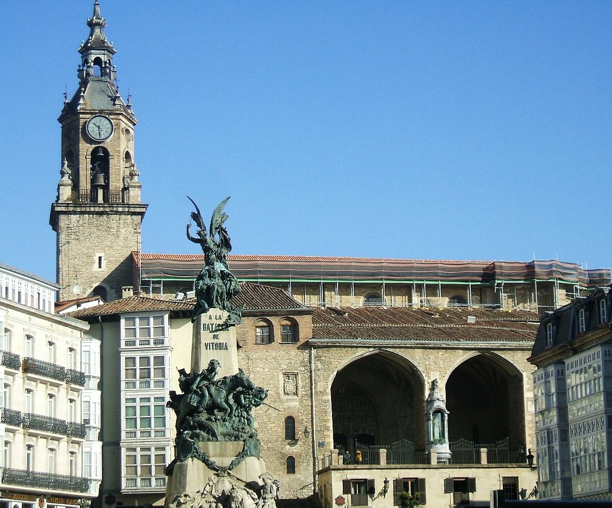 Iglesia de San Miguel Arcángel en Vitoria-Gasteiz, con el Monumento a la Batalla de Vitoria en primer término